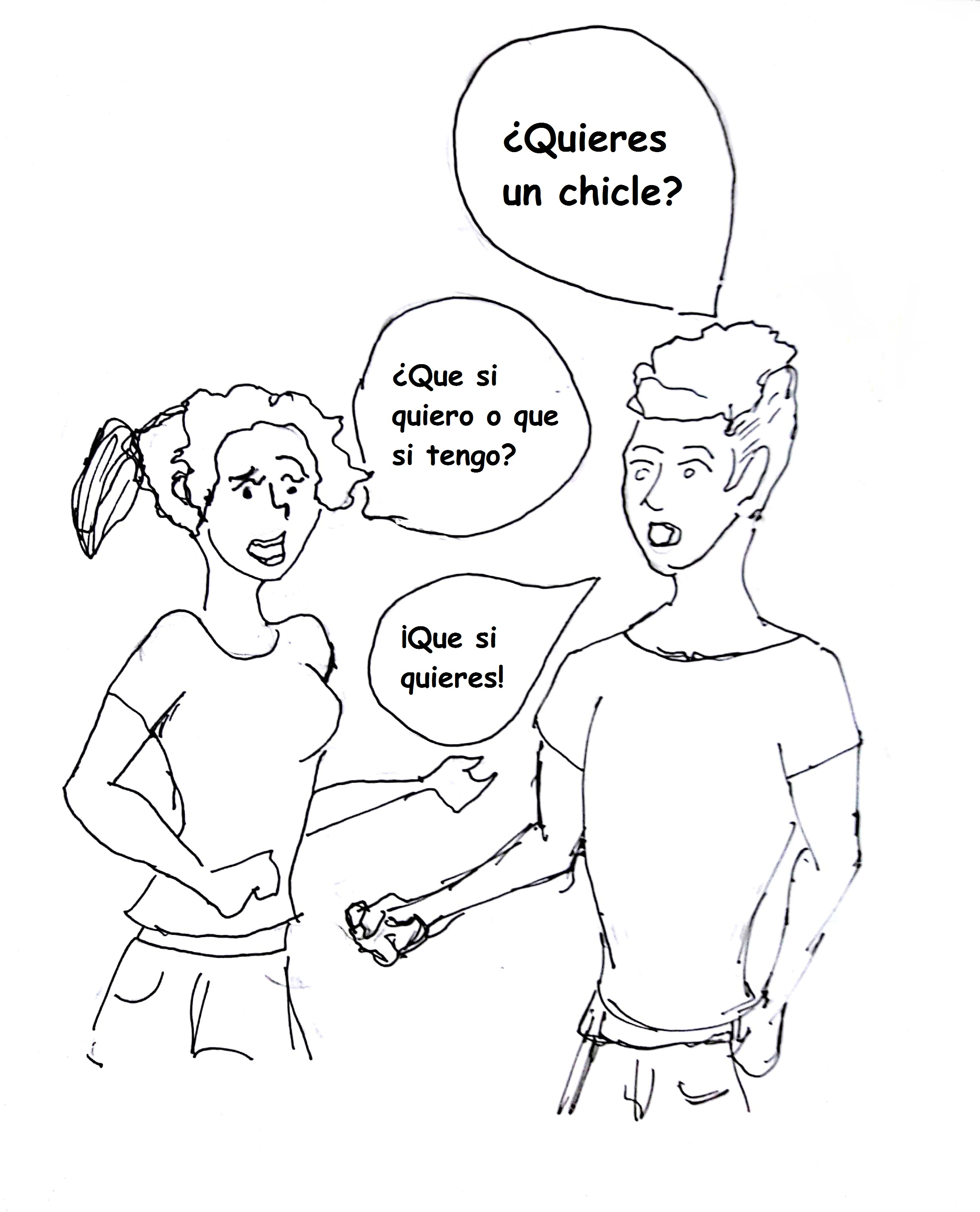 Teoría H&H